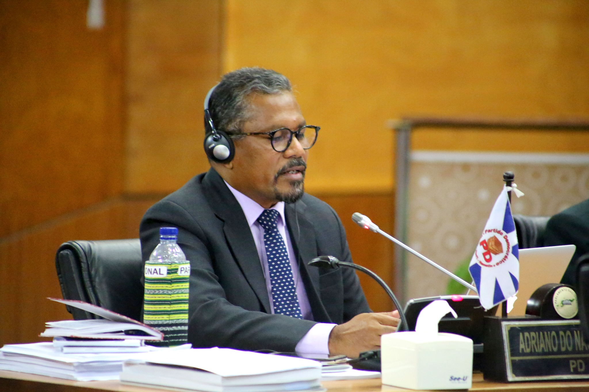 Adriano do Nascimento